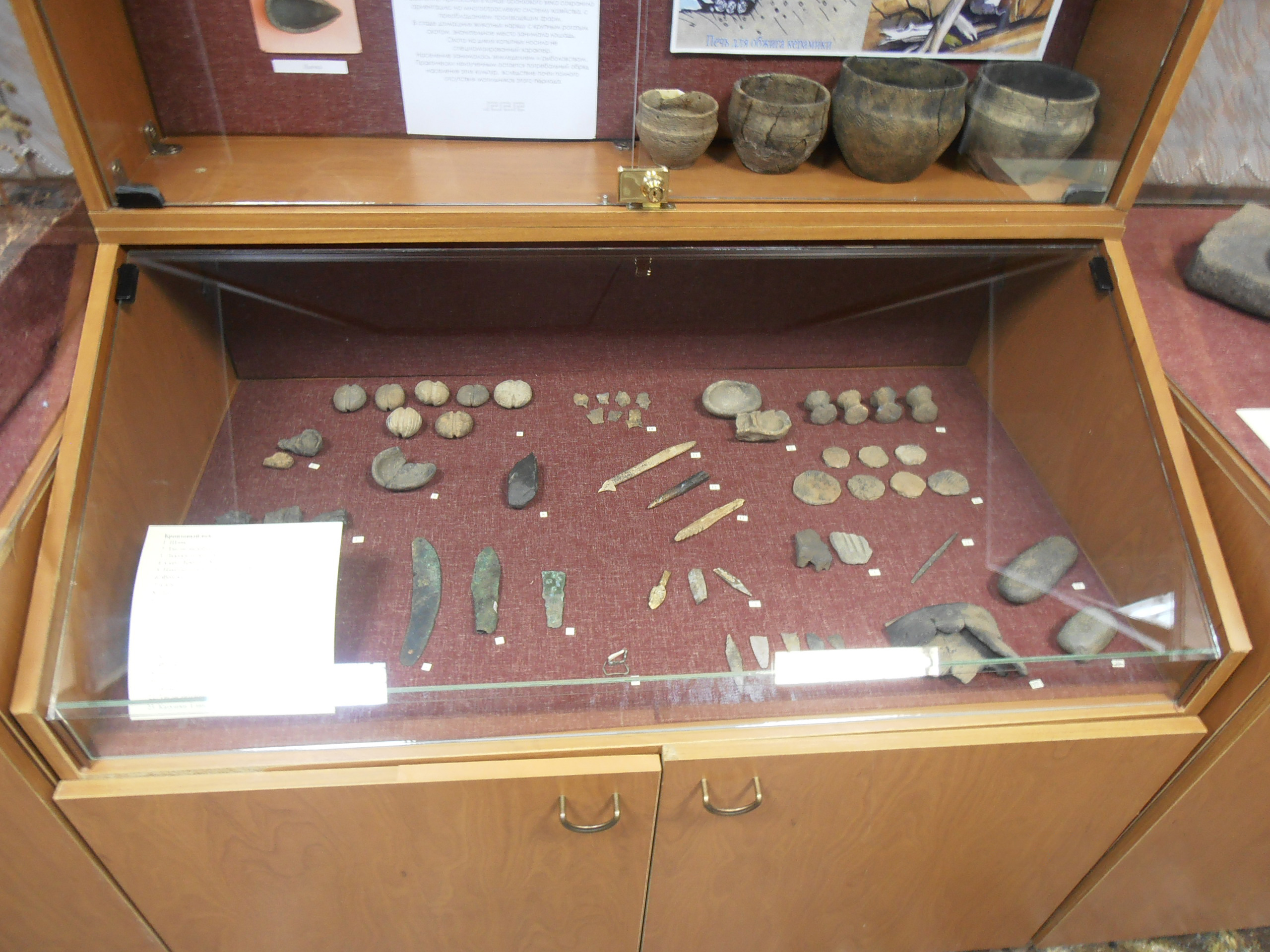 Артефакты Алакульской культуры (бронзовый век). Ингальская долина. Экспонаты зала археологии Музея археологии и этнографии Тюменского государственного университета.